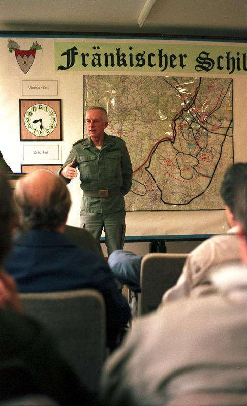 23.9.1986 Mitarbeiter des Bundespresseamtes beobachten das Herbstmanöver "Fränkischer Schild" der Bundeswehr- mit Beteiligung zahlreicher Soldaten aus NATO-Mitgliedsstaaten sowie eines französichen Großverbandes - im Raum Würzburg.